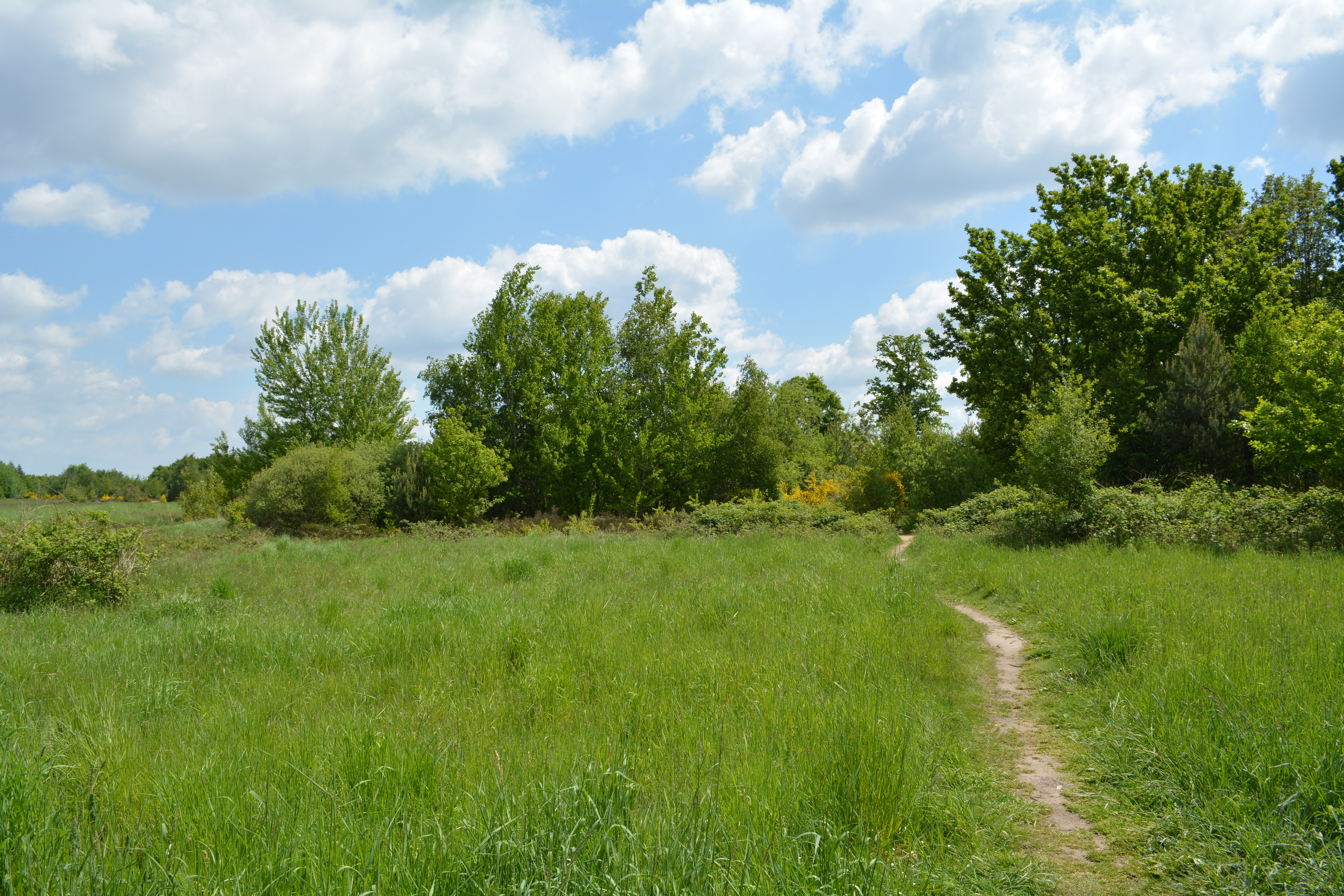 Drover Heide, Kreuzau